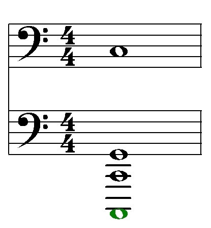 Beskrivelse - Akustischer BAss einer Orgel.